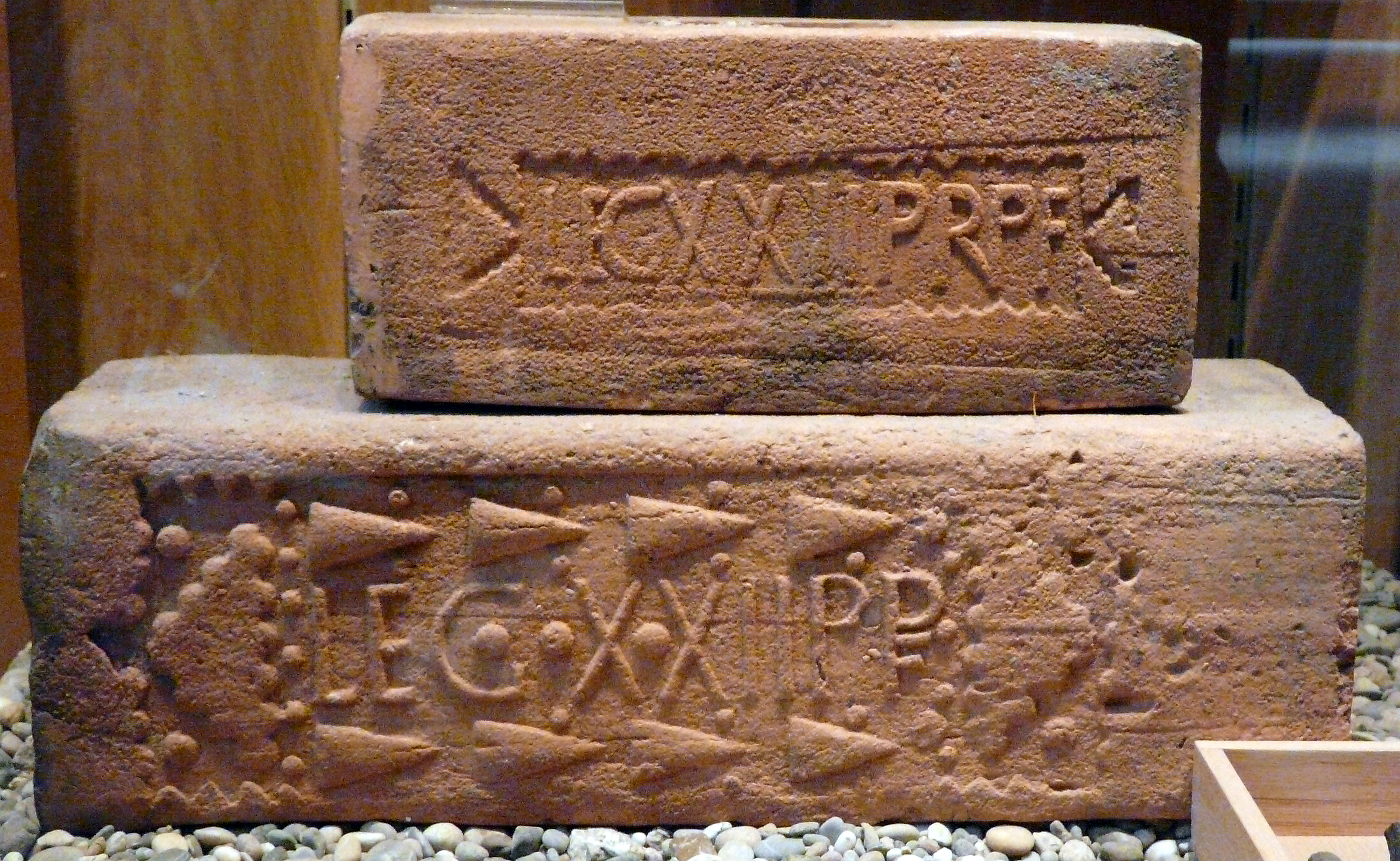 Ziegel der Legio XXII Primigenia im Saalburgmuseum